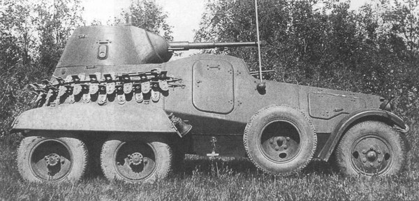 Вид сбоку